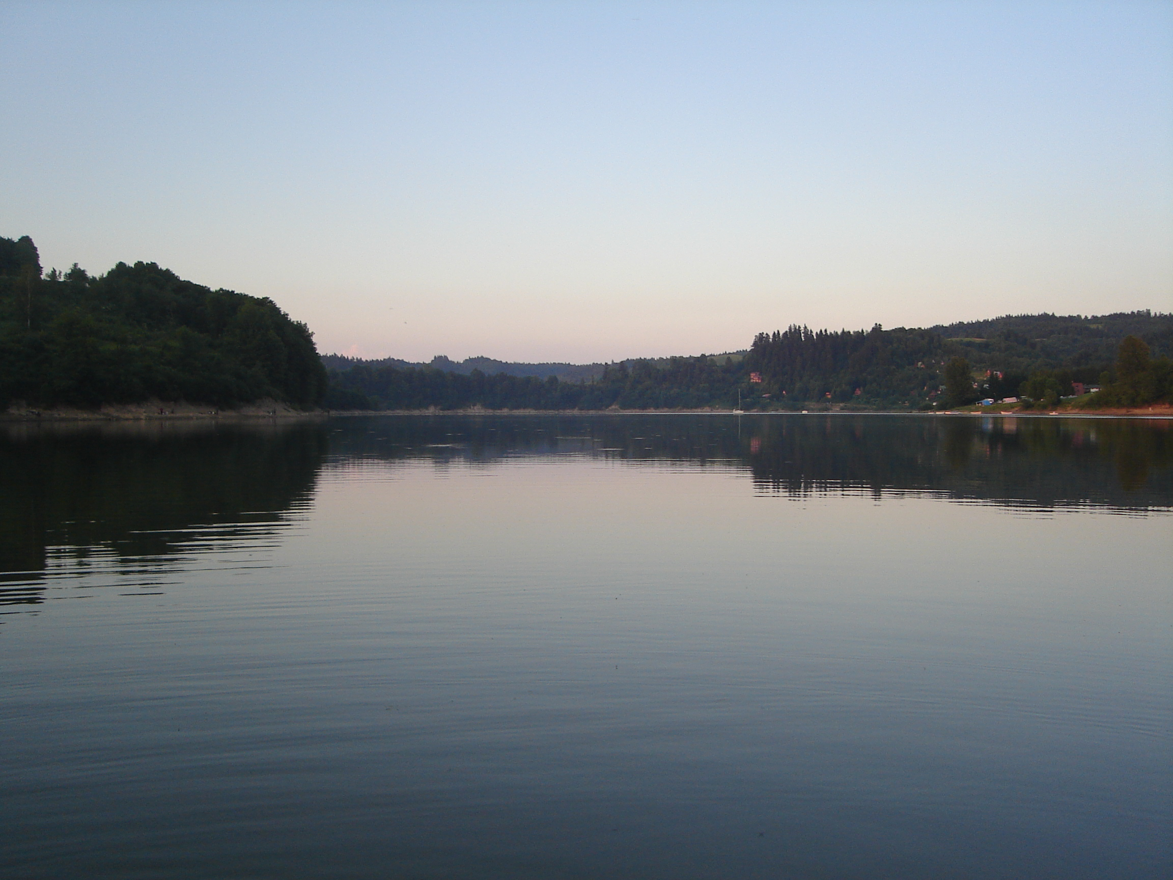 Ziornik Soliński w miejscowości Wołkowyja